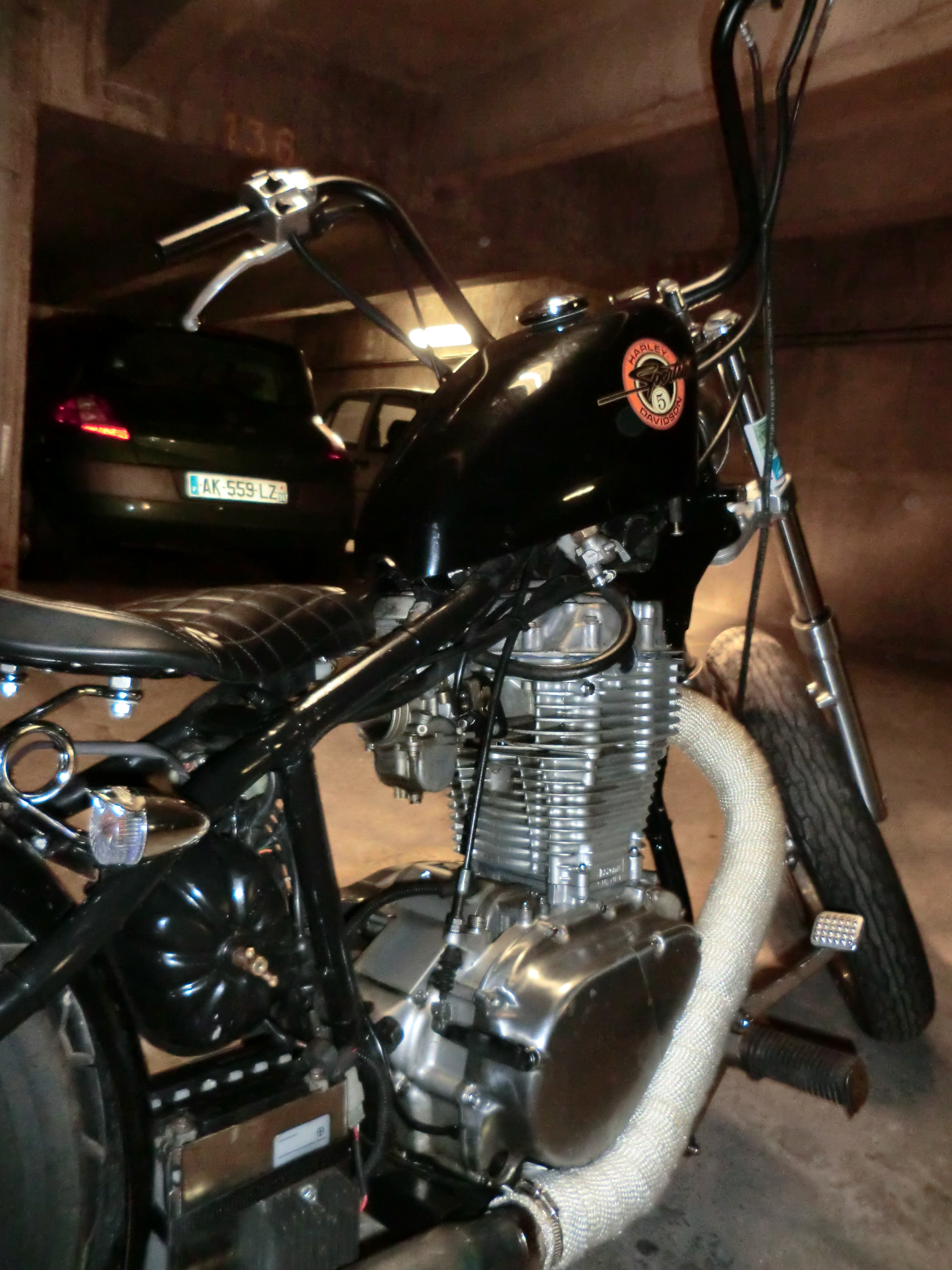 BOBBER on a base of one 650 savage